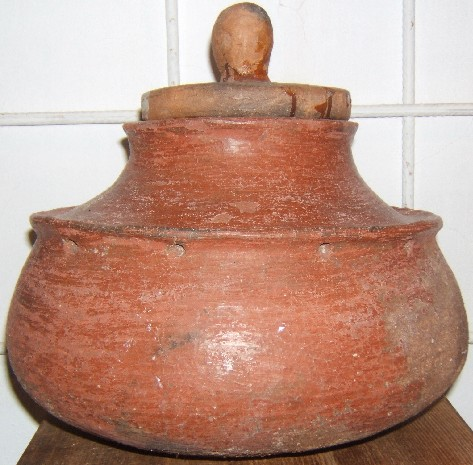 Bernegal de Chipude (Isla de La Gomera, Canarias). Museo de Cerámica de Chinchilla de Monte-Aragón (Albacete).